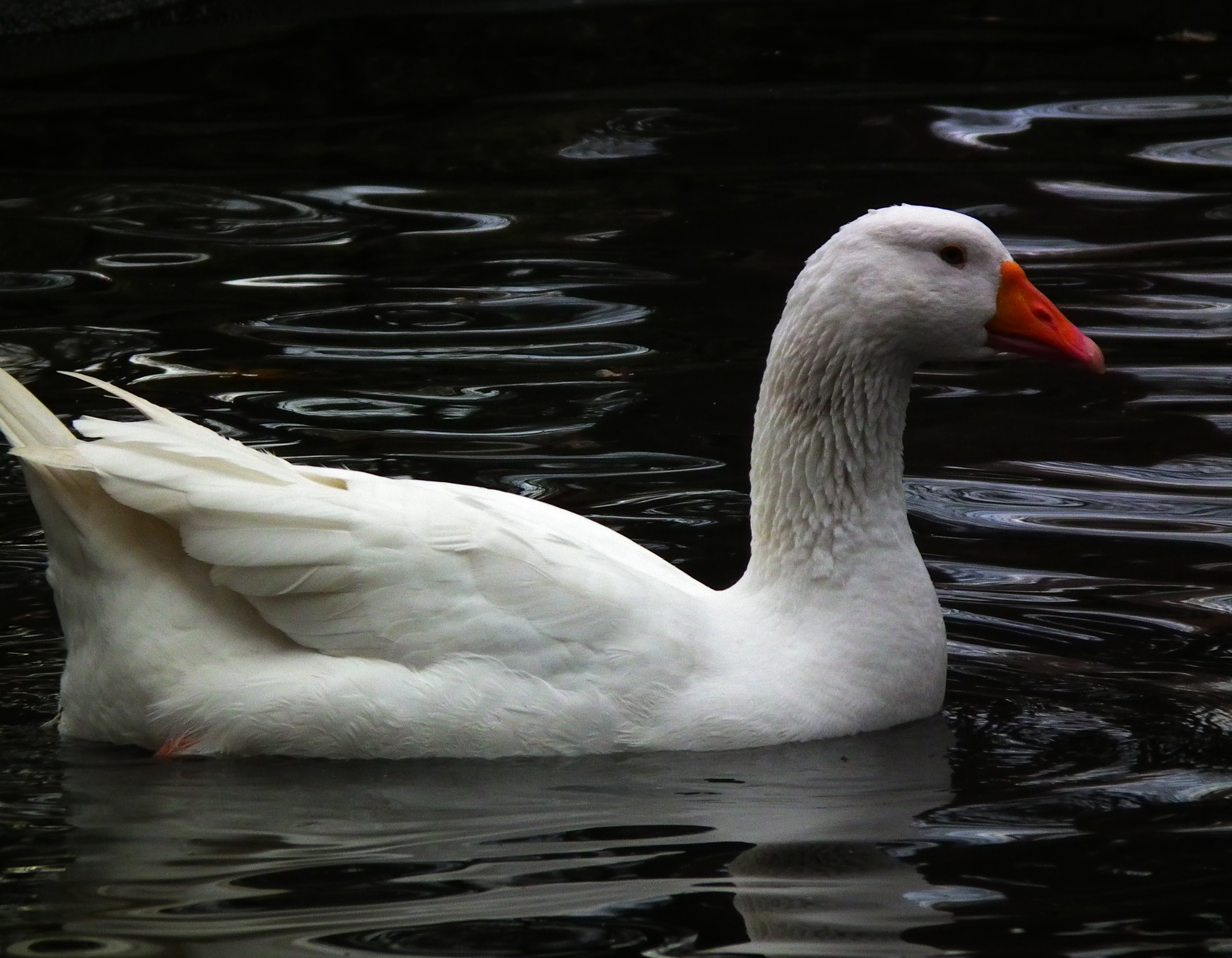 Vogelpark in Viernheim (Hessen, Deutschland)